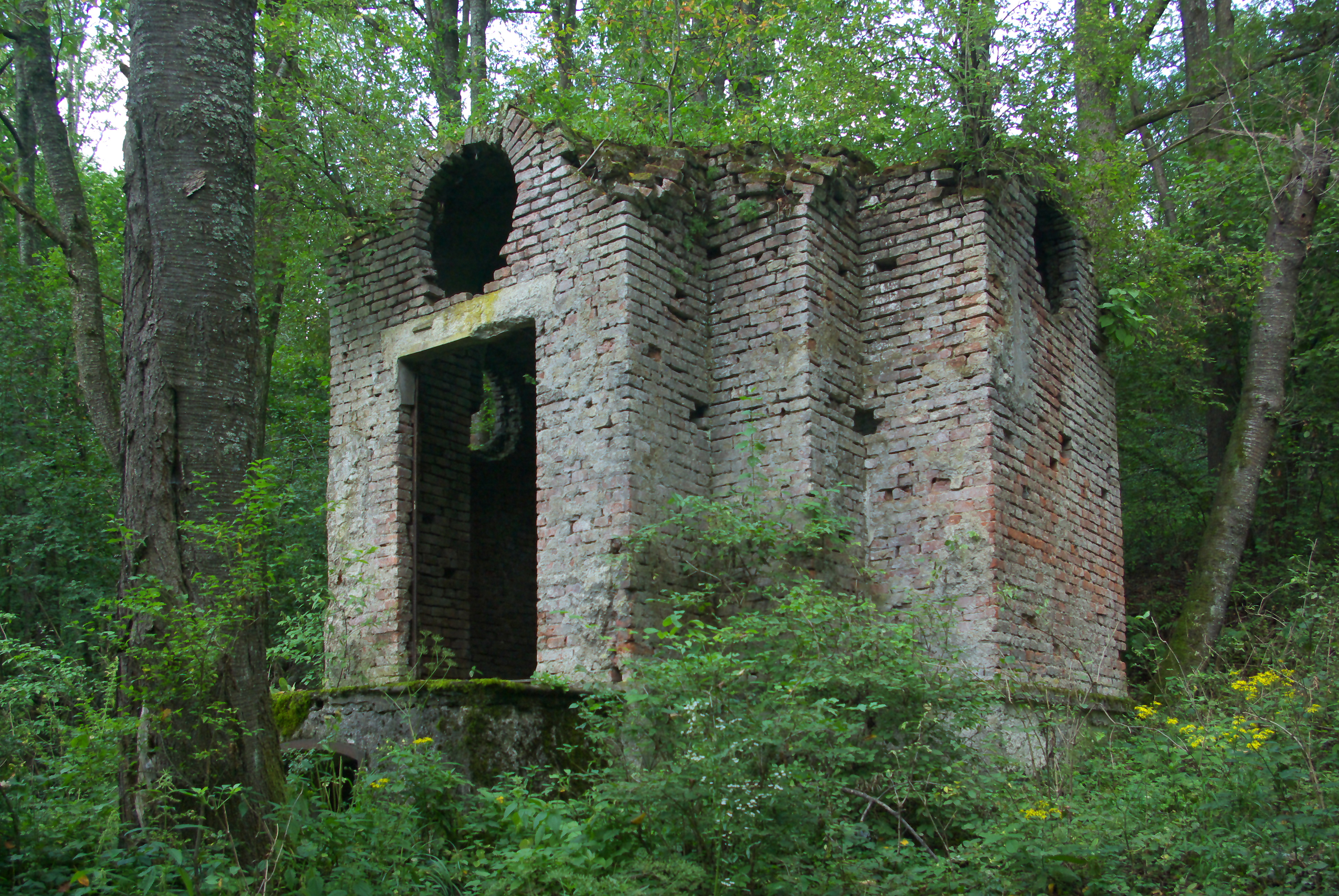 Tomb chapel of Wiktor family in Załuż